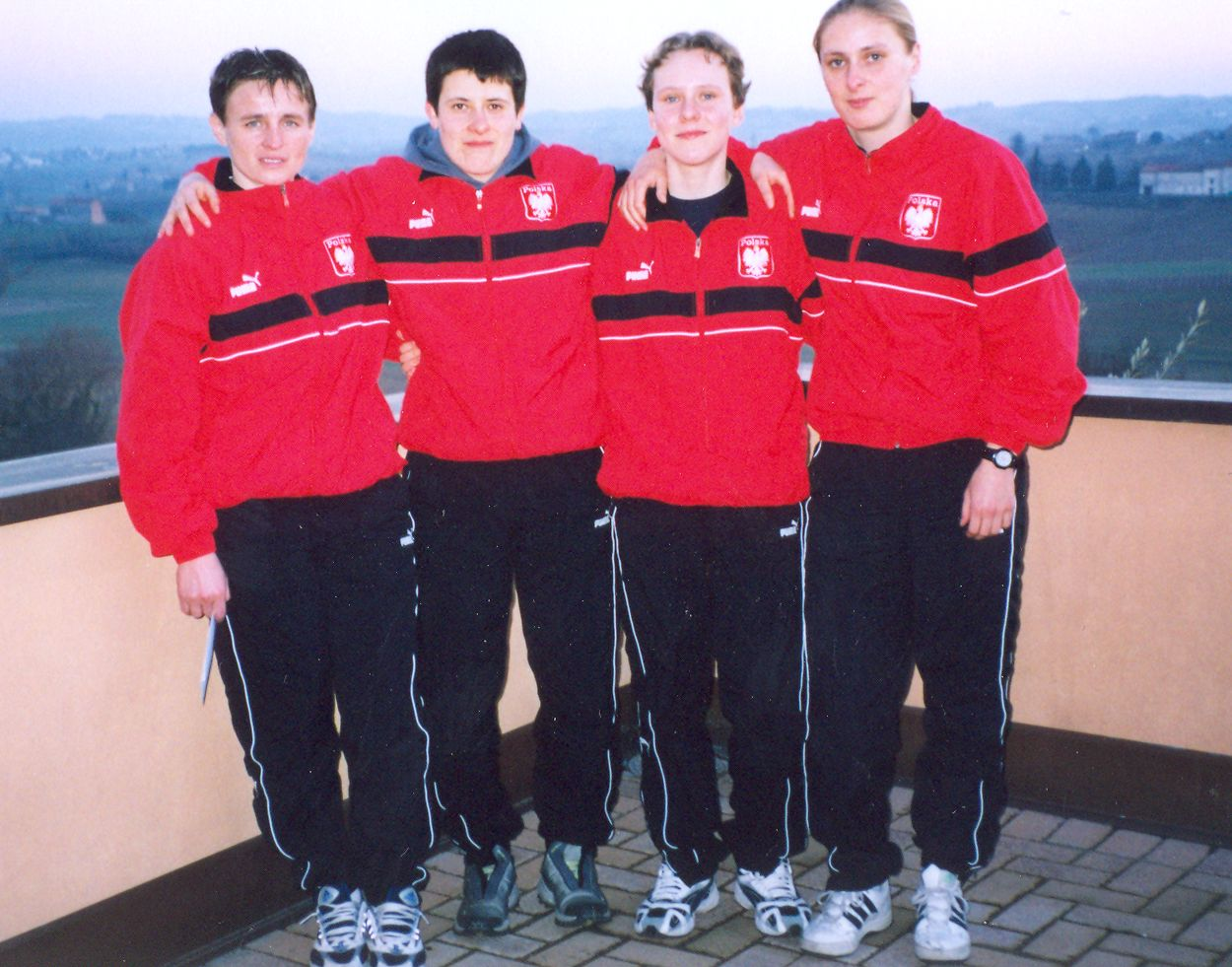 Reprezentantki Polski w piłkę nożną kobiet: Maria Makowska, Anna Gawrońska, Marta Stobba, Justyna Białasek